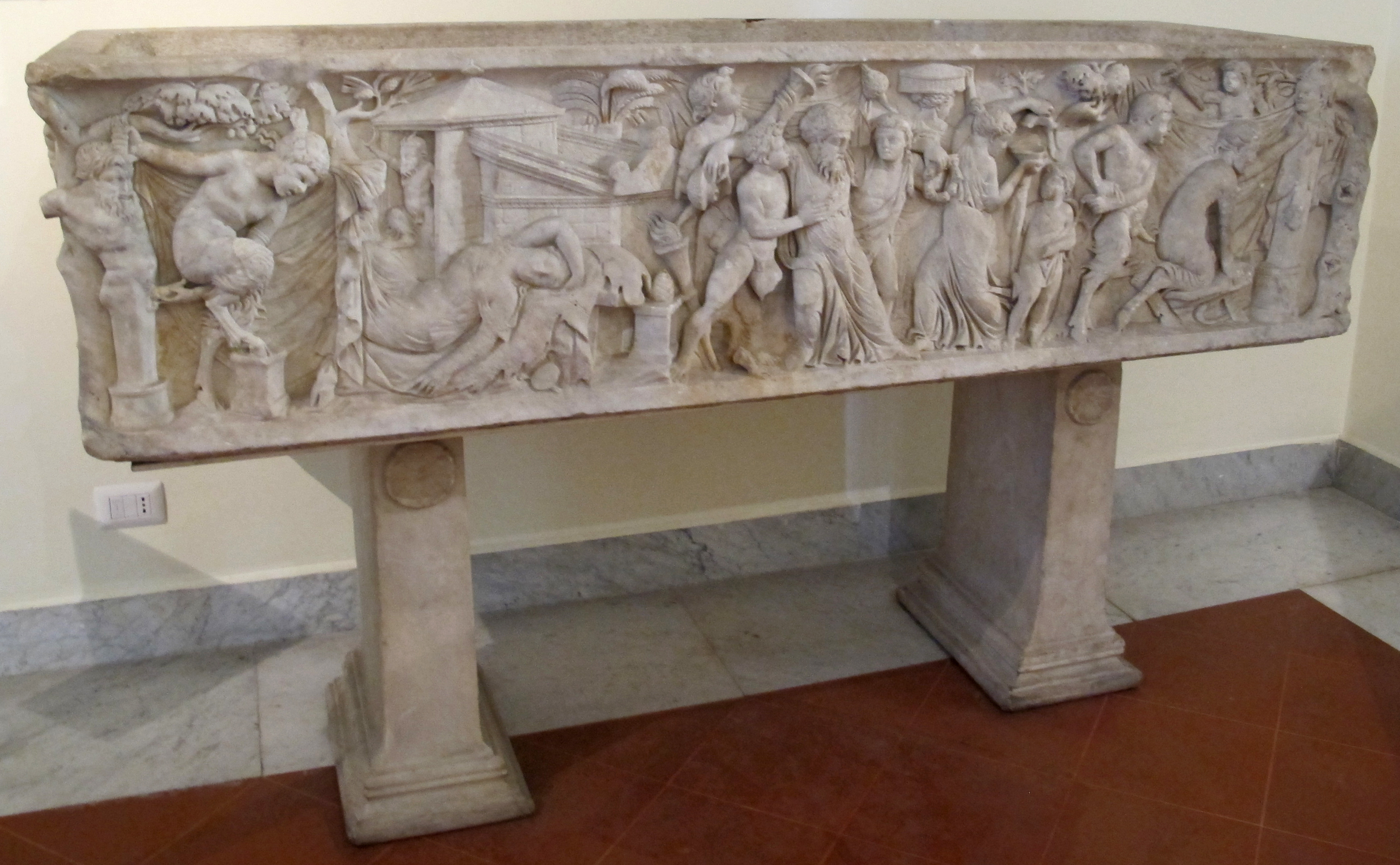 Ancient Roman sarcophagi in the Museo Archeologico (Naples)